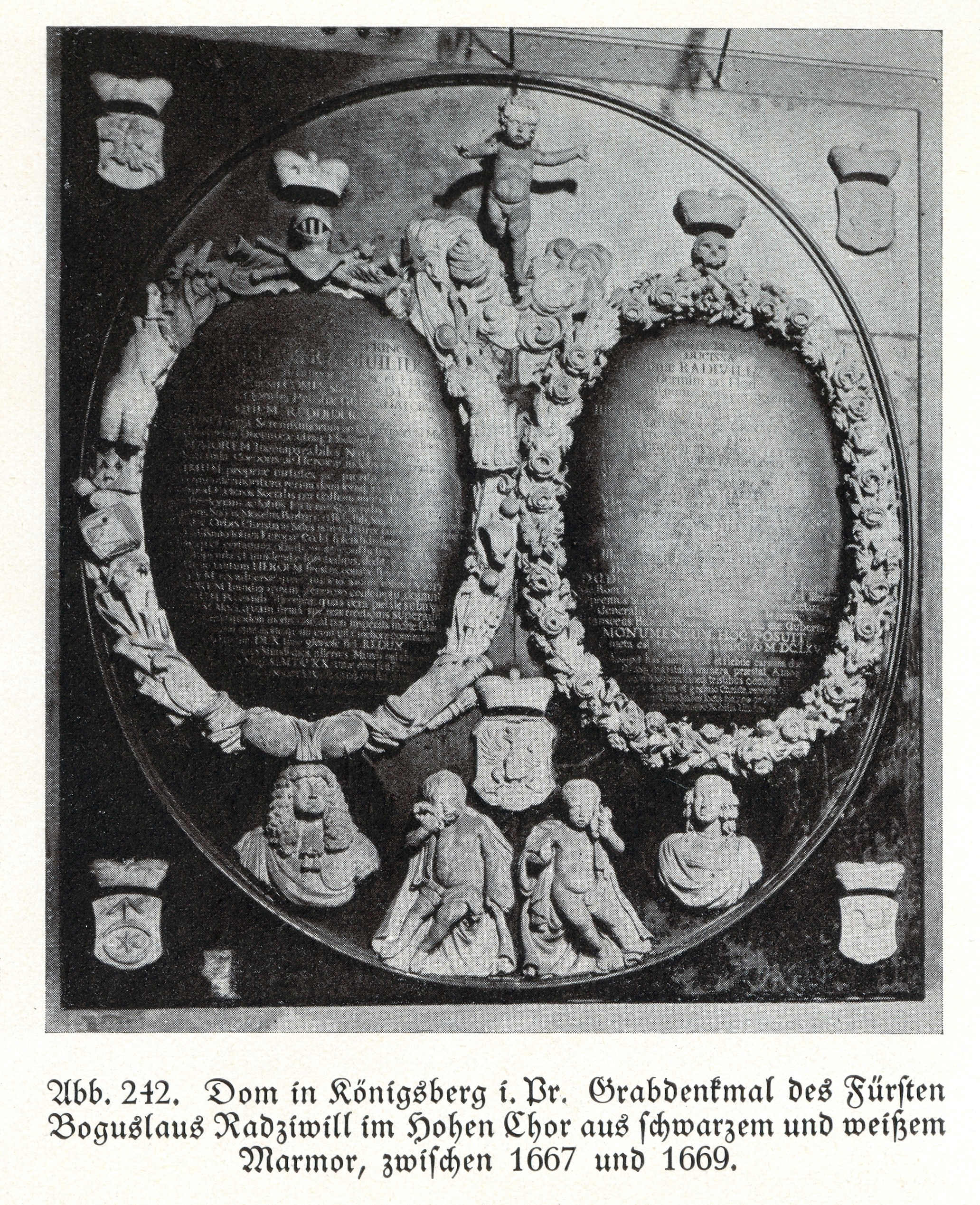 Königsberg, Dom, Denkmal des BOGUSLAUS RADZIWILL, 1669